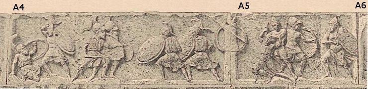 Relief mit einem Tropaion, Heroon von Gjölbaschi-Trysa, Innere Westwand, Feldschlacht zwischen Schiffslager und Troja, Steine A4-A5. Tropaion an der Steinfuge zwischen A4 und A5. Beschreibung: Otto Benndorf: Das Heroon von Gjölbaschi-Trysa, [1]. In: Jahrbuch der Kunsthistorischen Sammlungen in Wien, Jahrgang 9, 1889, Seite 1-134, hier: 119, pdf.